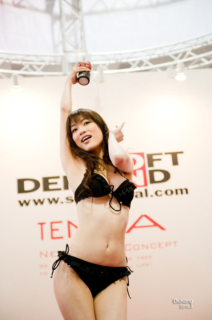 sod av女优 星野あかり 星野明 Akari Hoshino